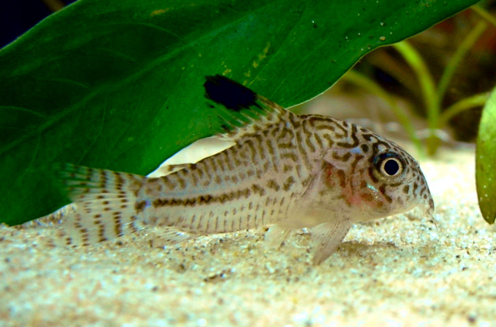 Dreibindenpanzerwels (Corydoras trilineatus)